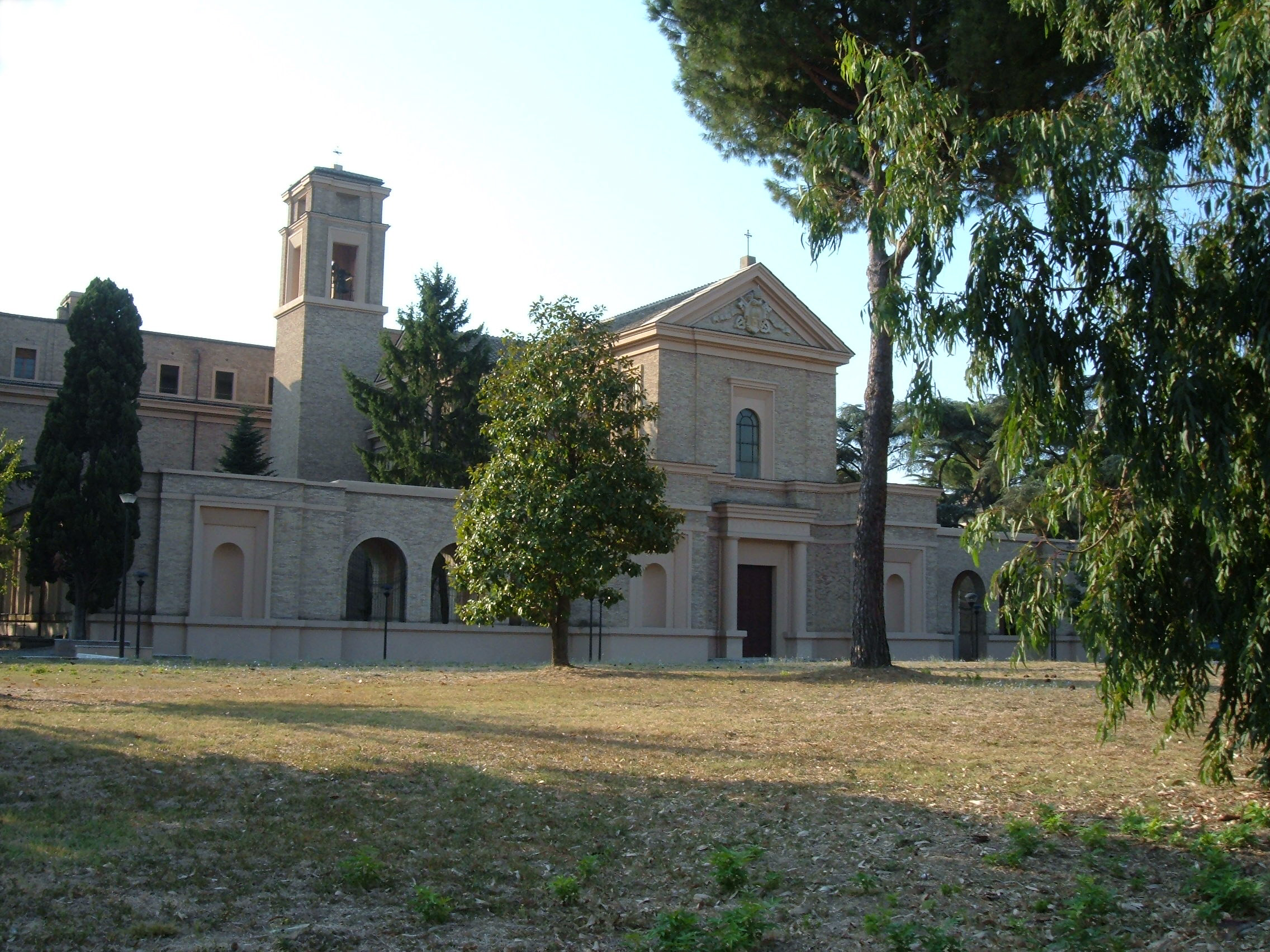 Chiesa di Santa Maria della Visitazione, nell'Abbazia di San Girolamo, a Roma, nel quartiere Aurelio (via di Torre Rossa). Sede del Pontificio Istituto di Musica Sacra